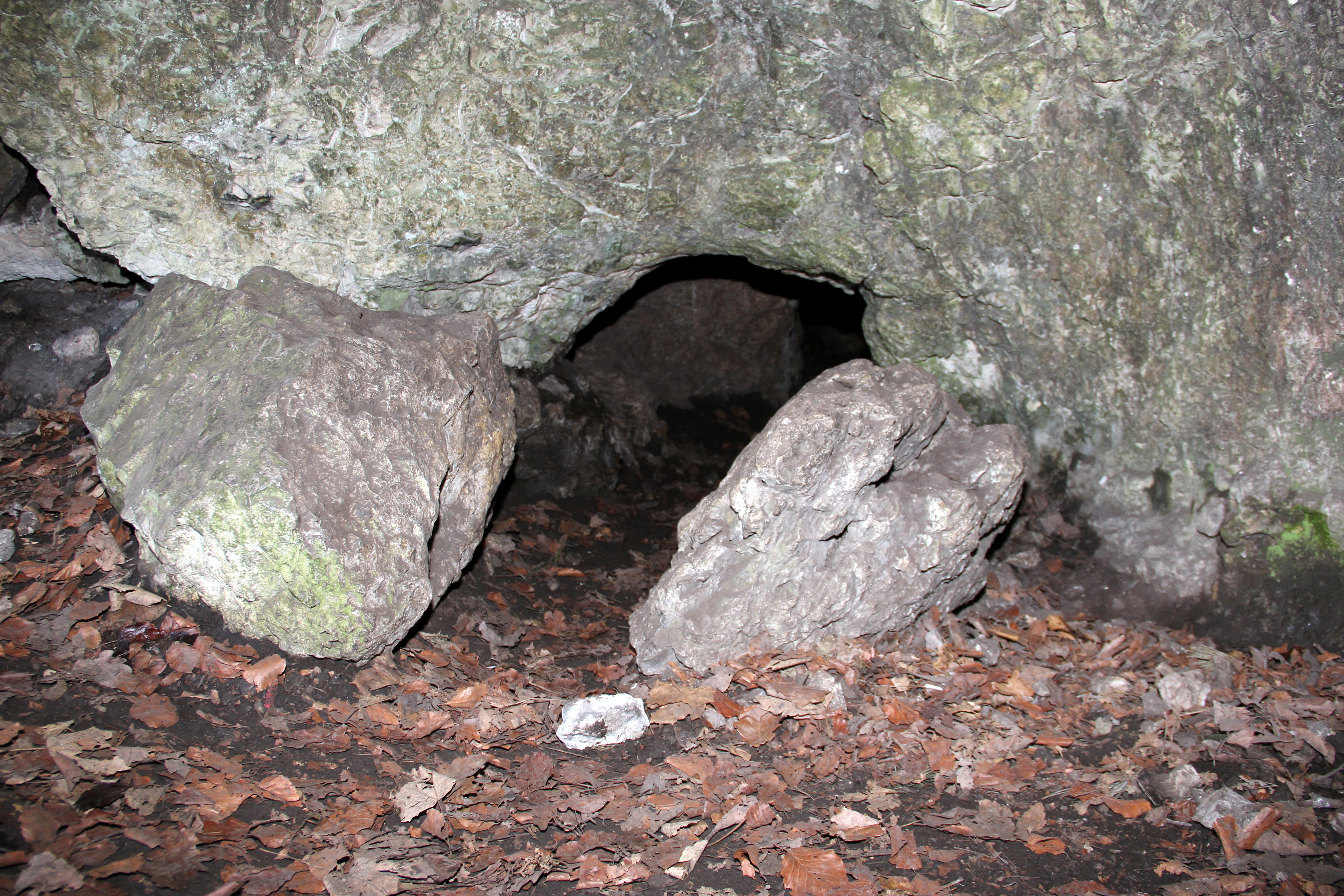 Wundershöhle, Innen, Blick auf Eingang